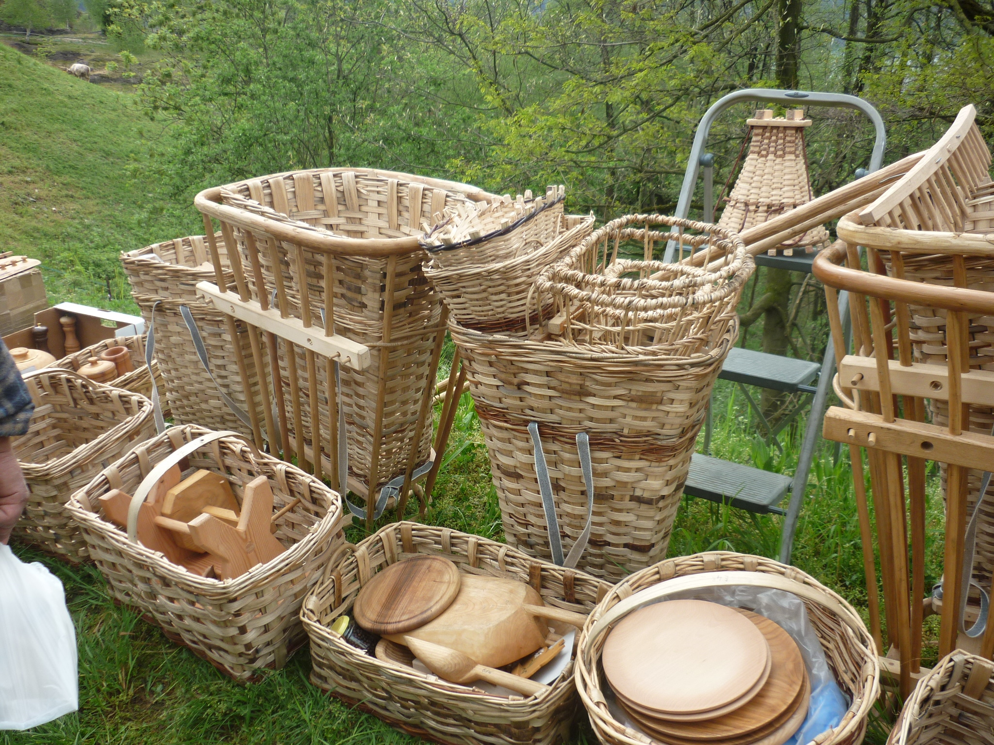 vari tipi di gerle e cestini